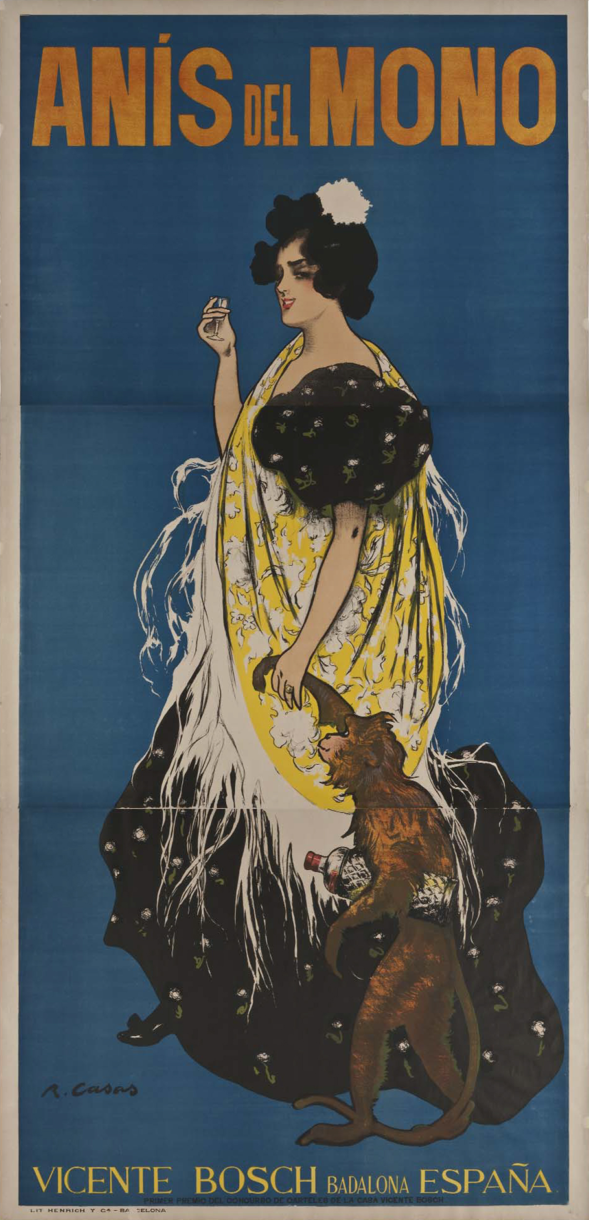 Anís del Mono. Referencias.